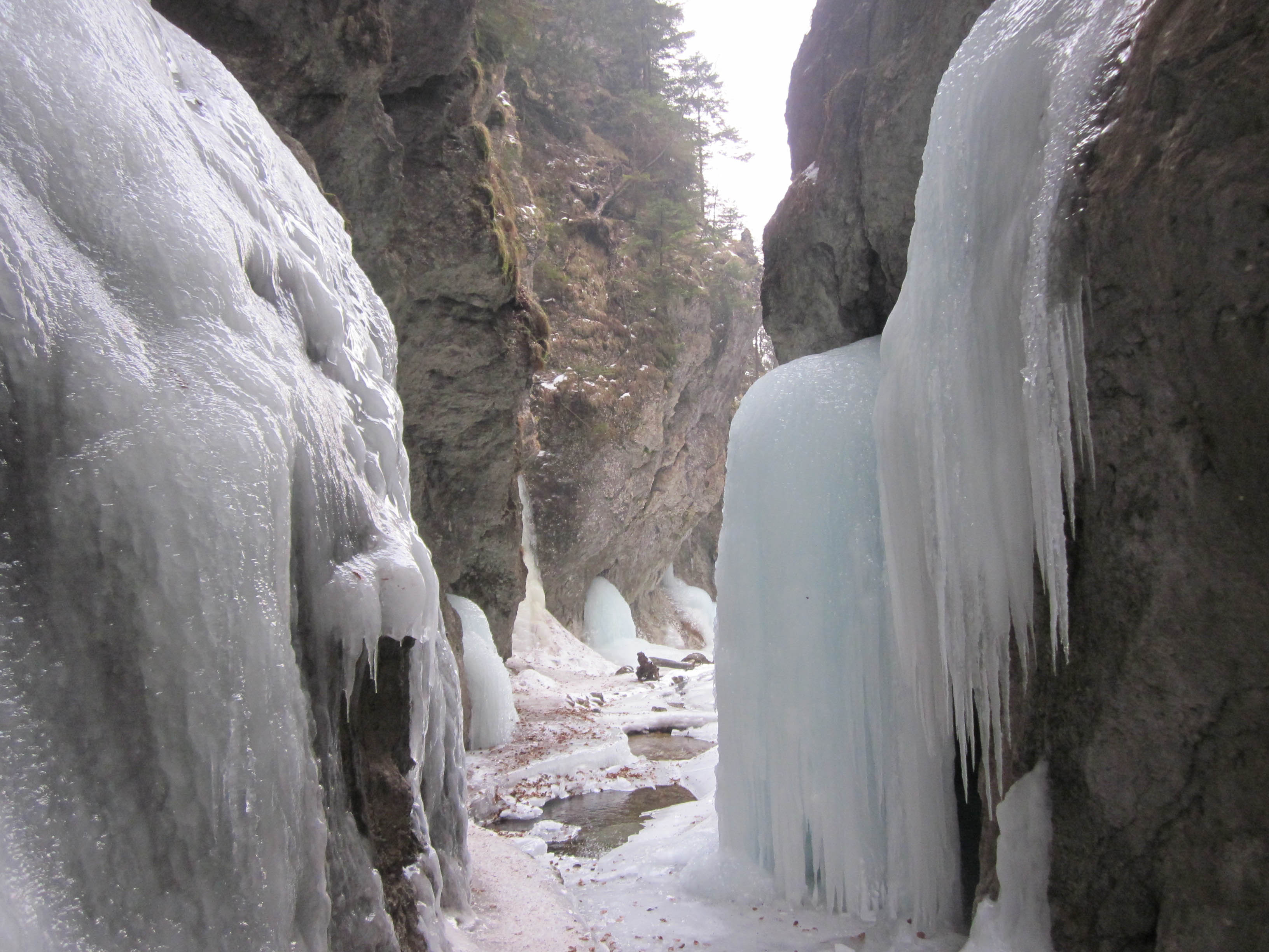 Jánošíkove diery v zime, Malá Fatra